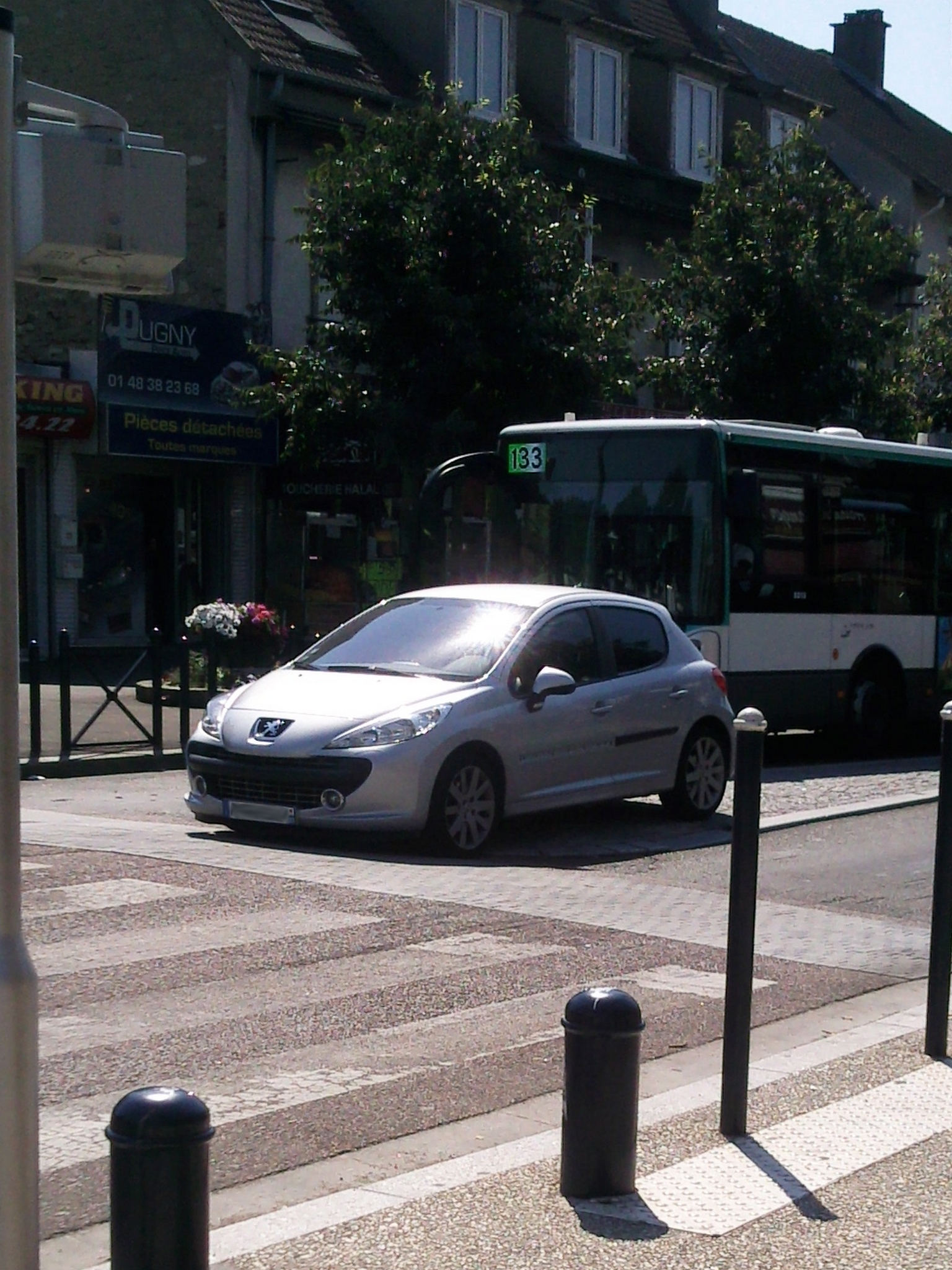 La RD 114 à Dugny et le bus 133 en direction de la gare de Sarcelles - Saint-Brice.